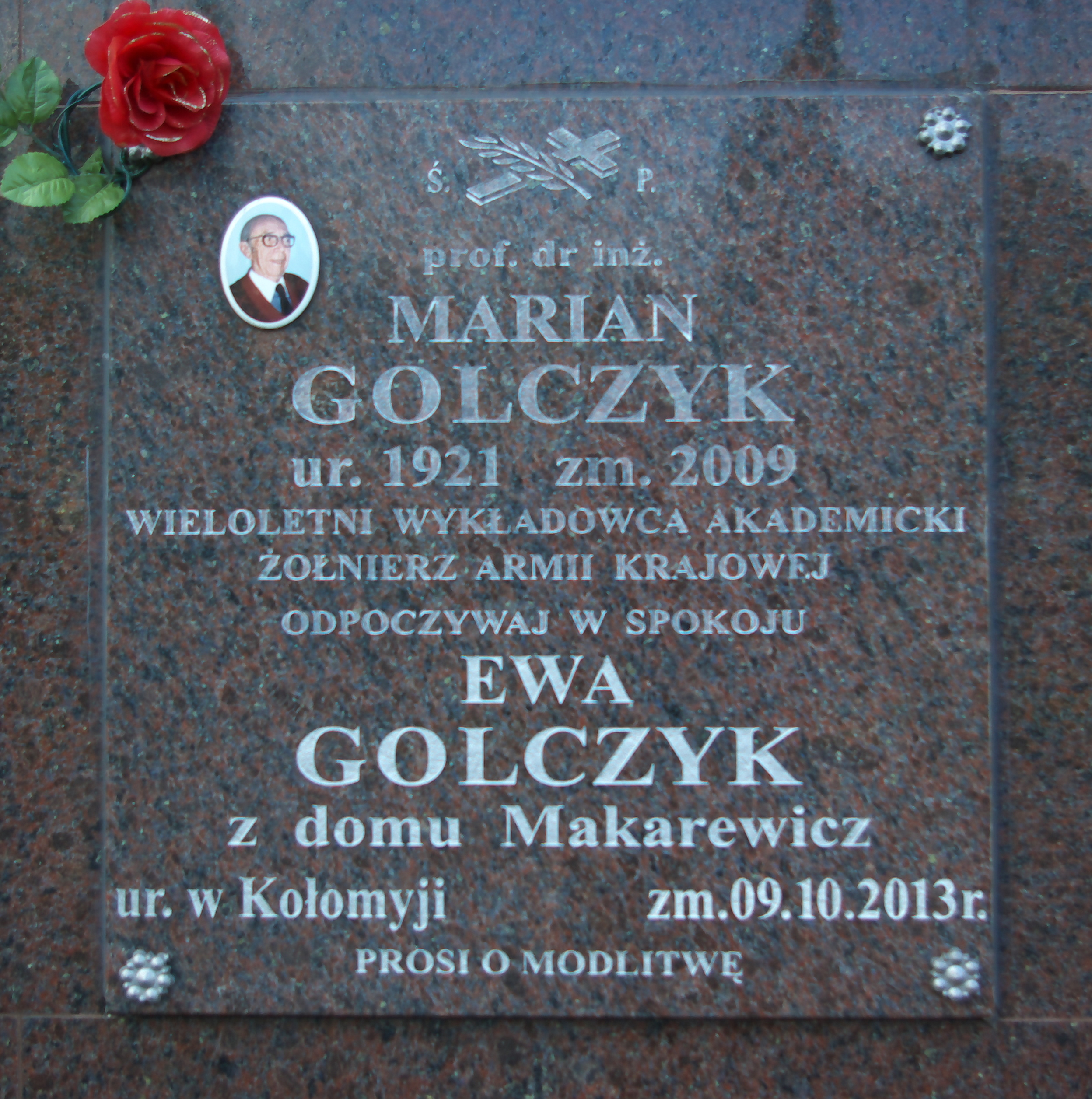 Miejsce pochówku prochów prof. dra inż. Mariana Golczyka i jego żony Ewy na Cmentarzu Centralnym w Sanoku (kolumbarium)